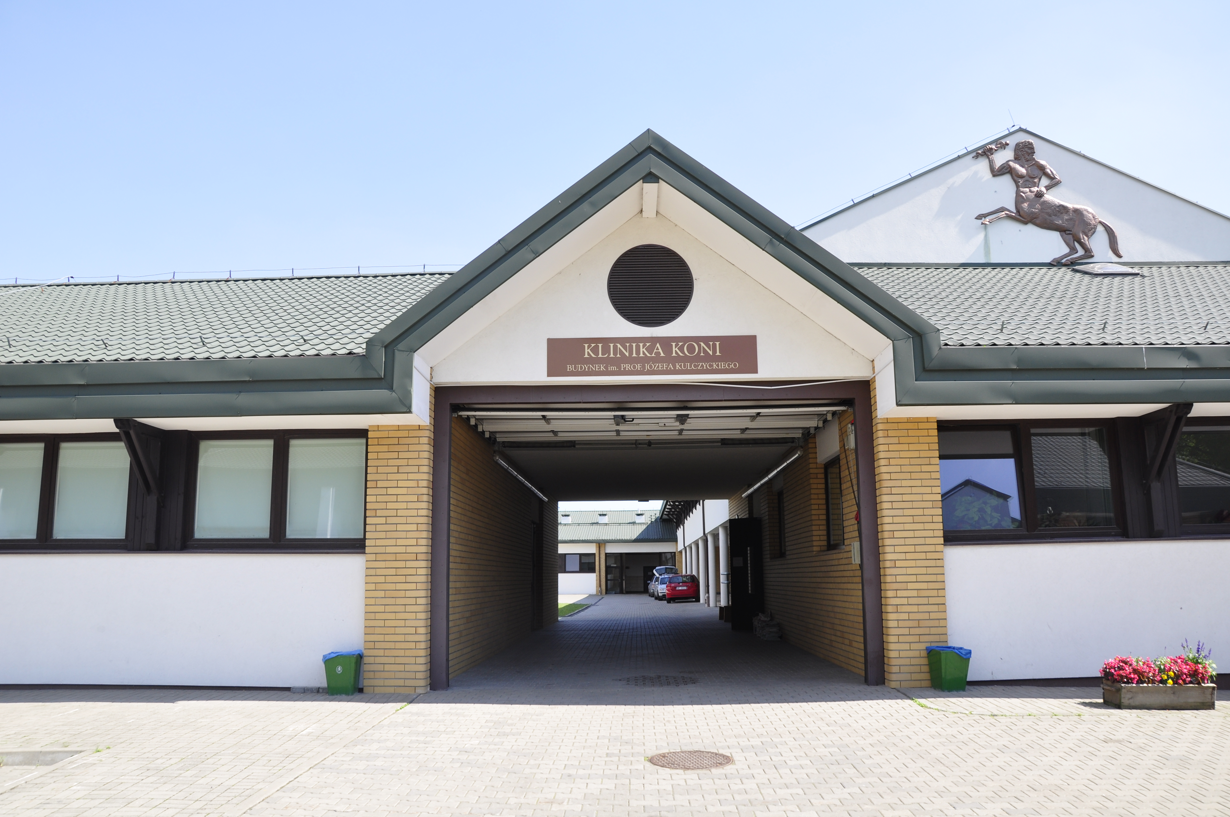 Warschau Ursynow, SGGW, Pferdeklinik